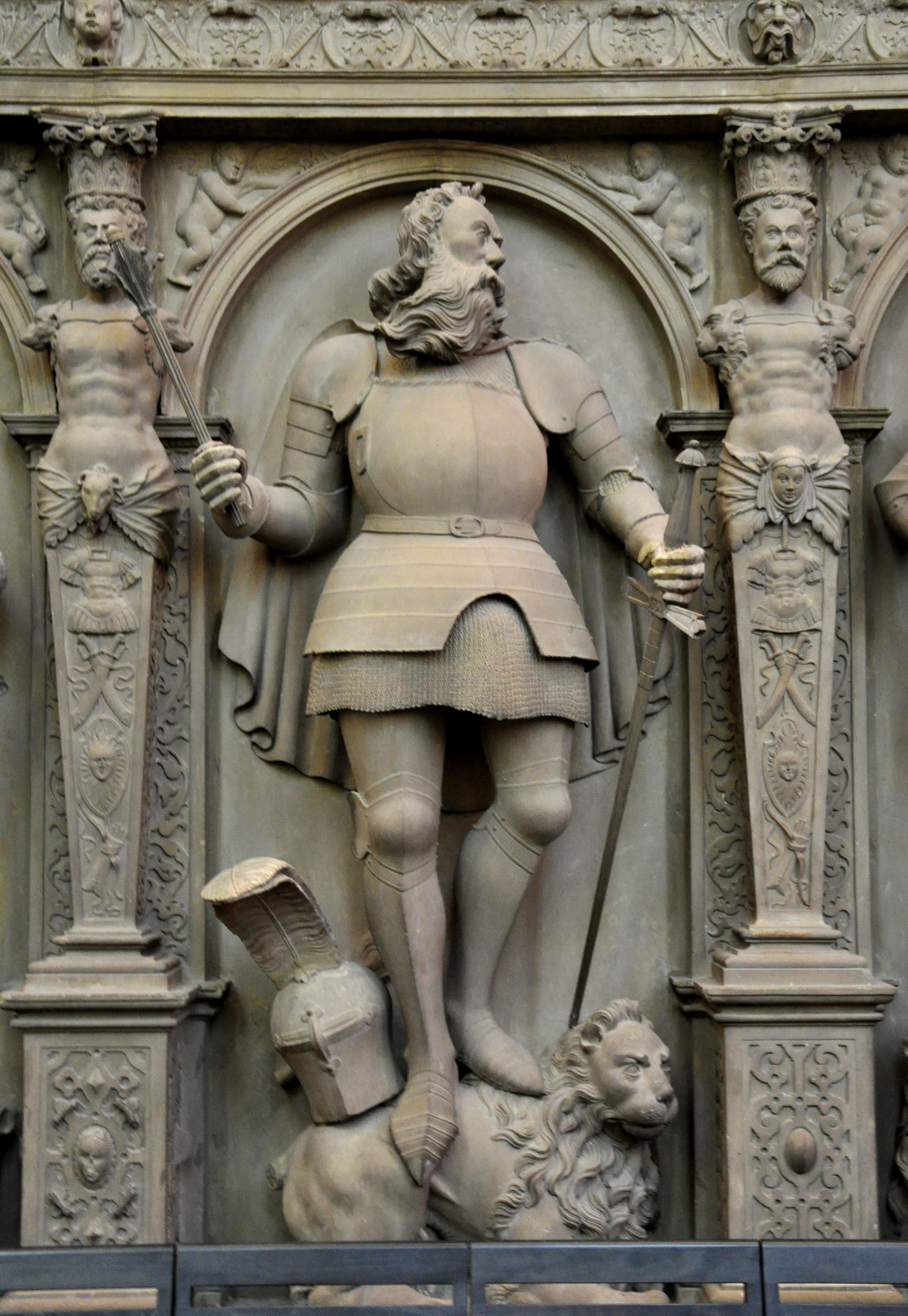 Stuttgart, Chor der Stiftskirche, Grafenstandbilder von Sem Schlör (ab 1576 entstanden zum Ersatz der ursprünglichen Epitaphe der in der Stiftskirche beigesetzten Grafen von Württemberg) Figur 7: Ulrich († 1388 in der der Schlacht bei Döffingen), Sohn Eberhards des Greiners